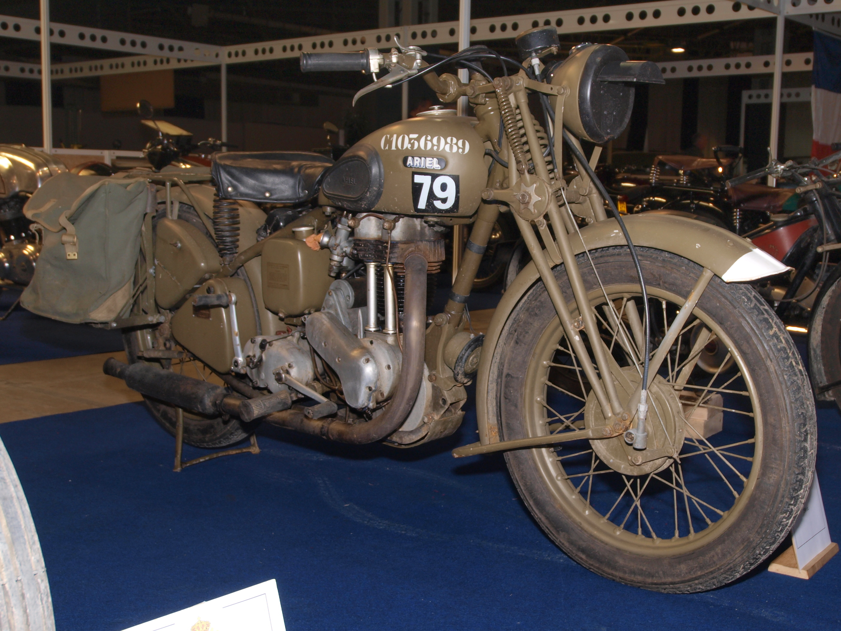 Ariel NG 350cc (1941)